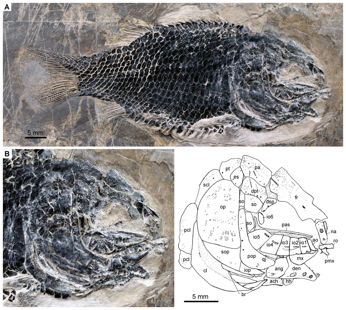 Specimen IVPP V24273. Fuyuanichthys wangigen. et sp. nov., IVPP V24273. (A) complete skeleton. (B) skull and pectoral girdle.